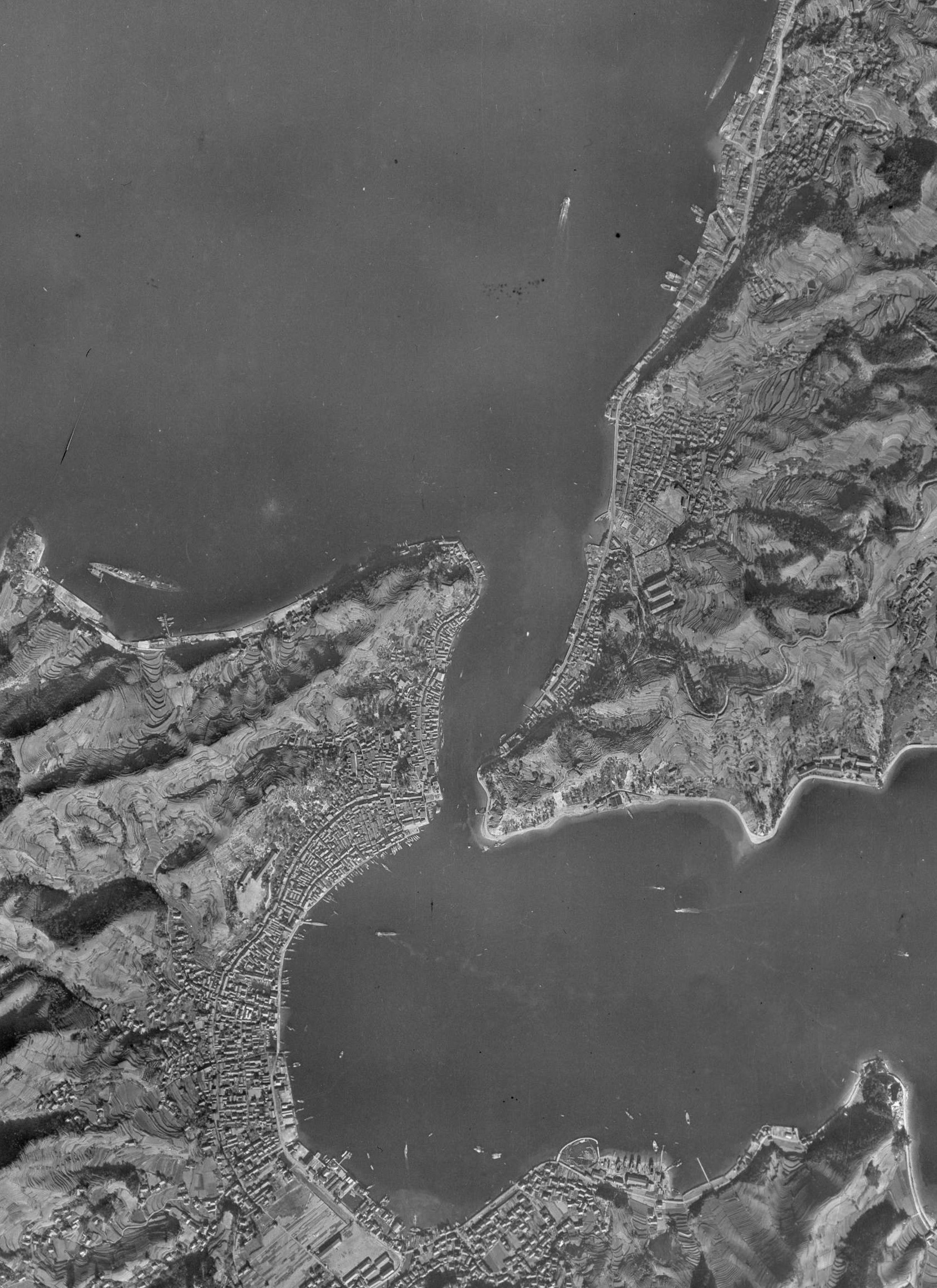 1947年の広島県呉市音戸の瀬戸。米軍撮影。